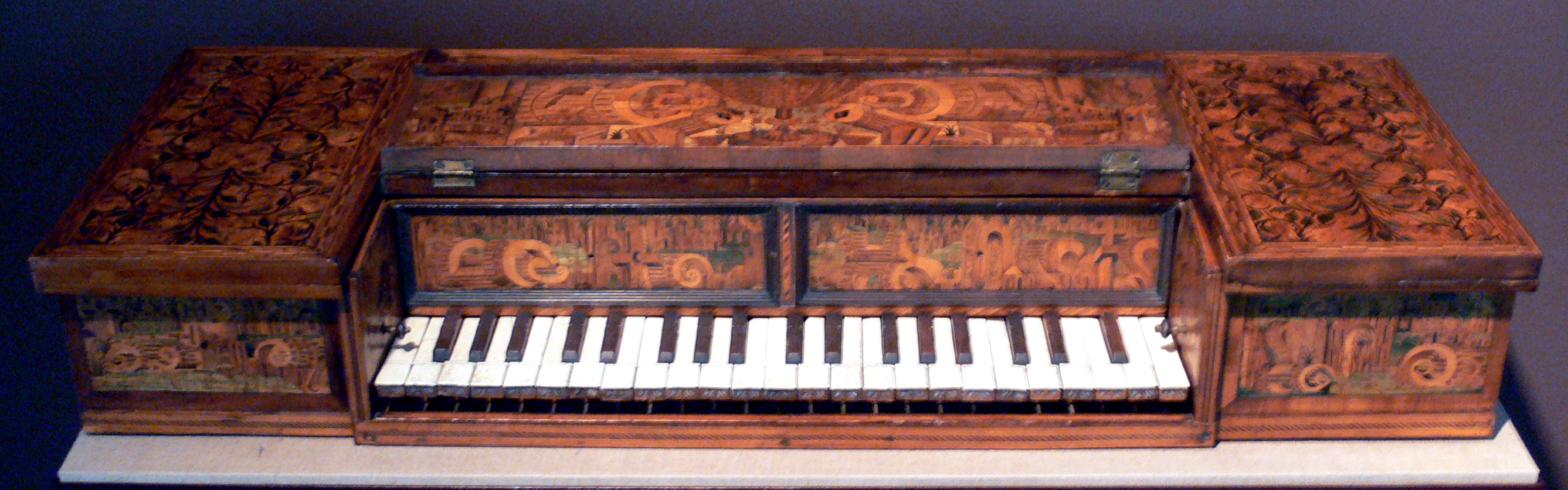 Rechteckiges Virginal. Anonym, vermutlich Augsburg, um 1600 Musikinstrumentenmuseum Berlin, Kat.-Nr. 2217.